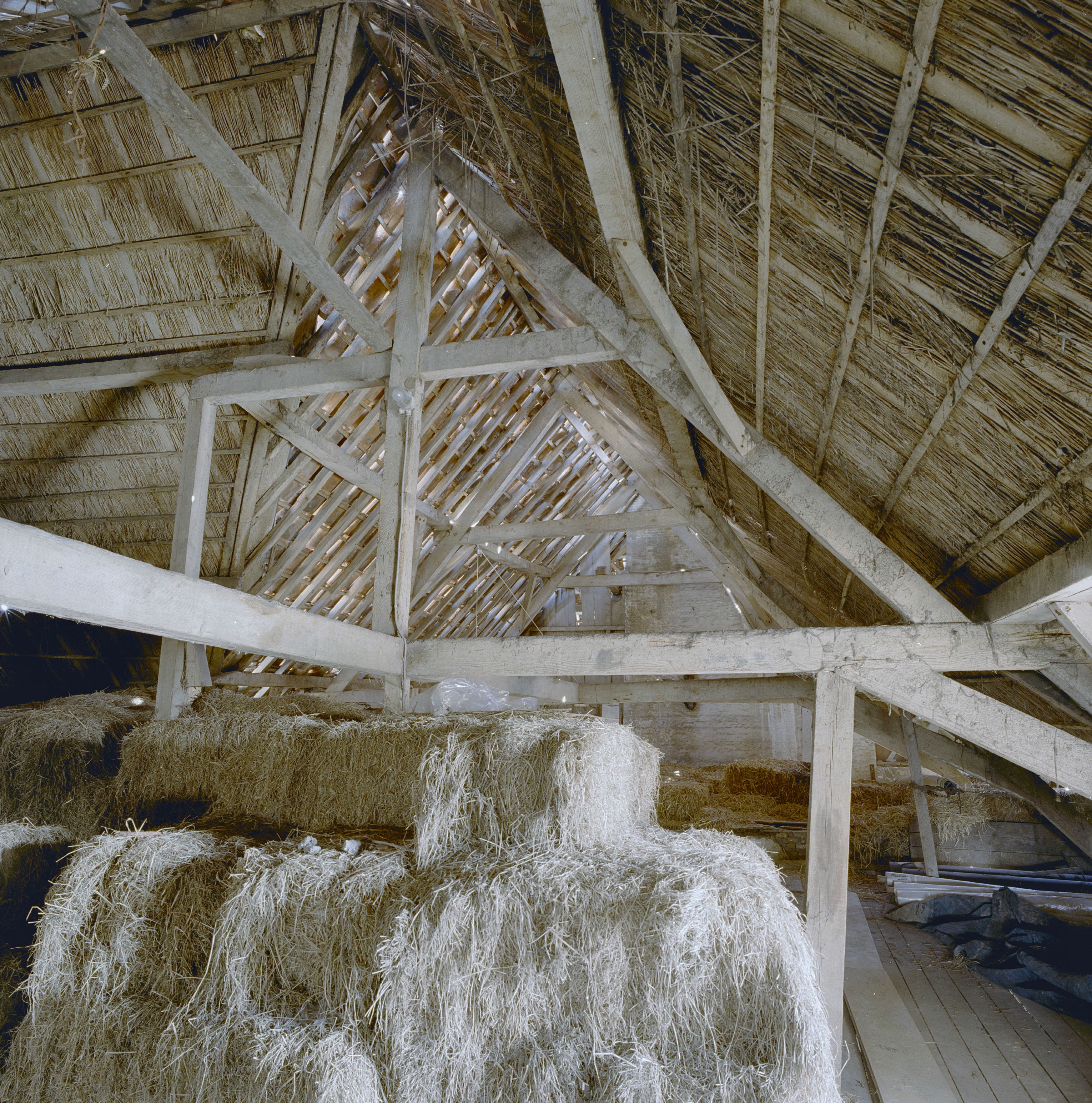 Boerderij Vlietwoning: Interieur grote schuur, hooizolder en kapconstructie